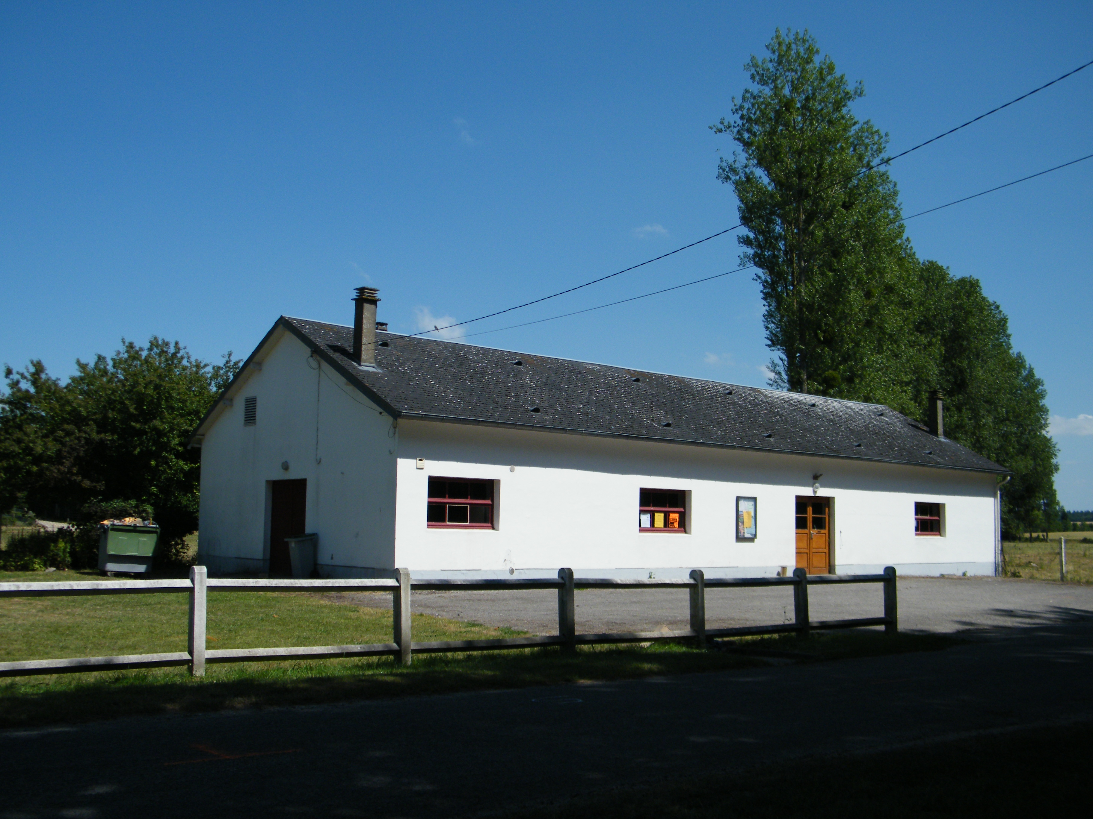 Salle communale, Machiel, Somme, France